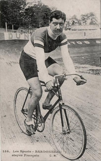 Bardonneau, stayer français